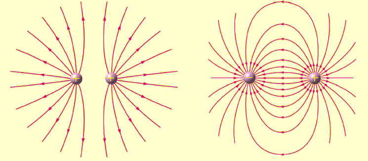 Representación de campo eléctrico producido por dos cargas